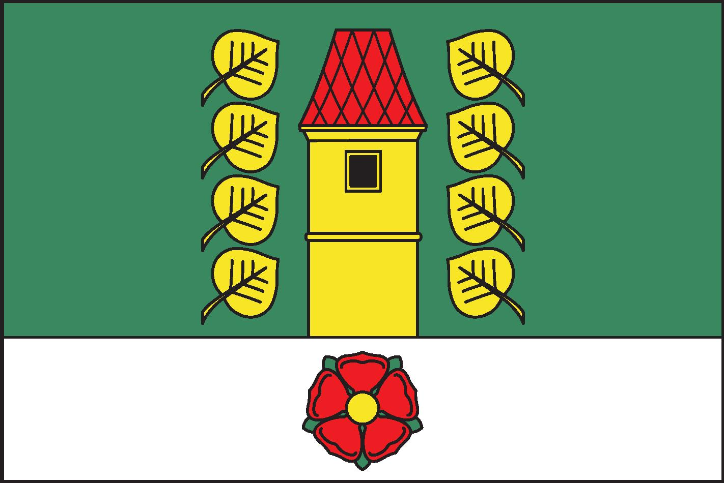 vlajka,Malonty , okres Český Krumlov